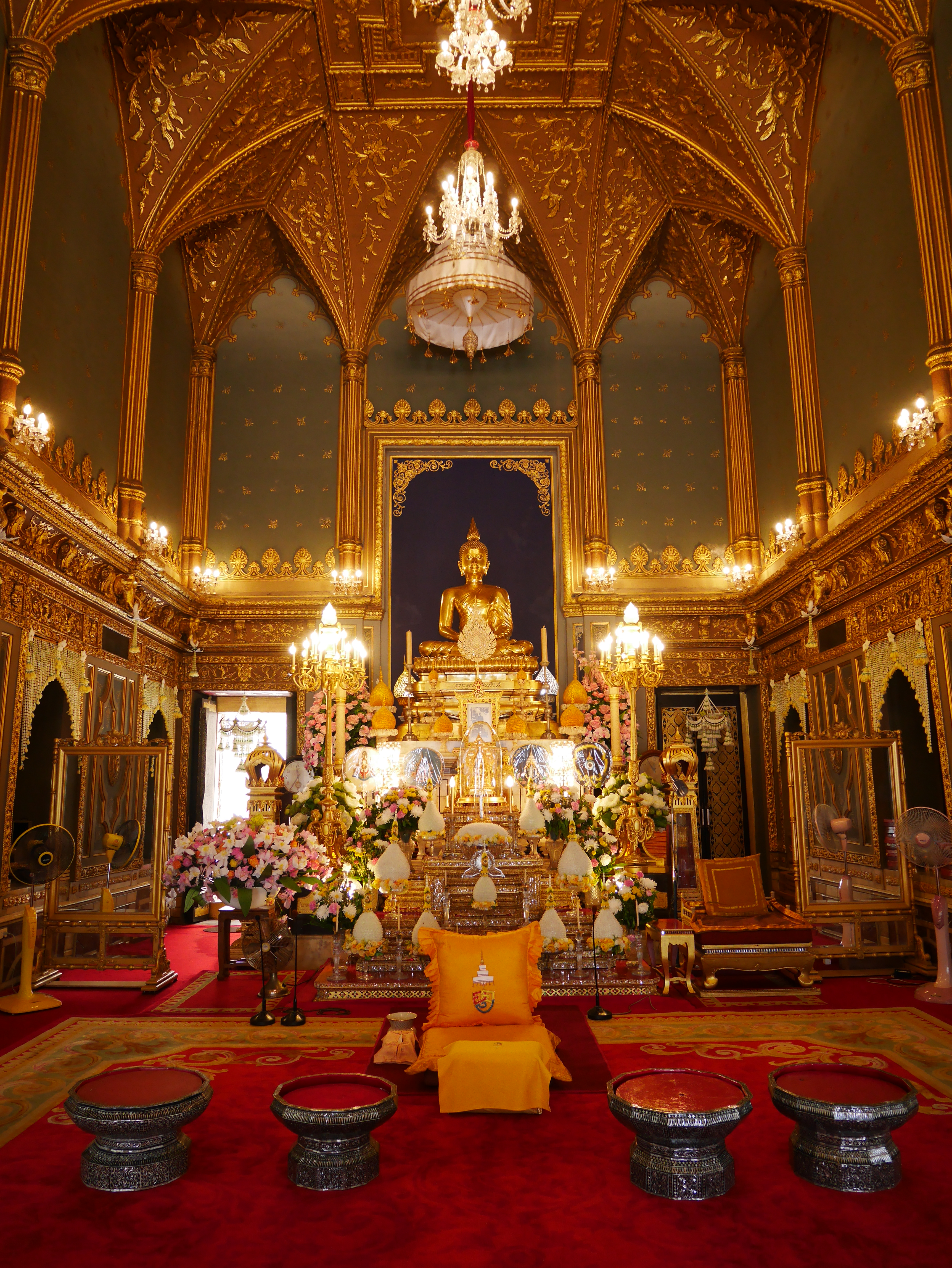 วัดราชบพิธ